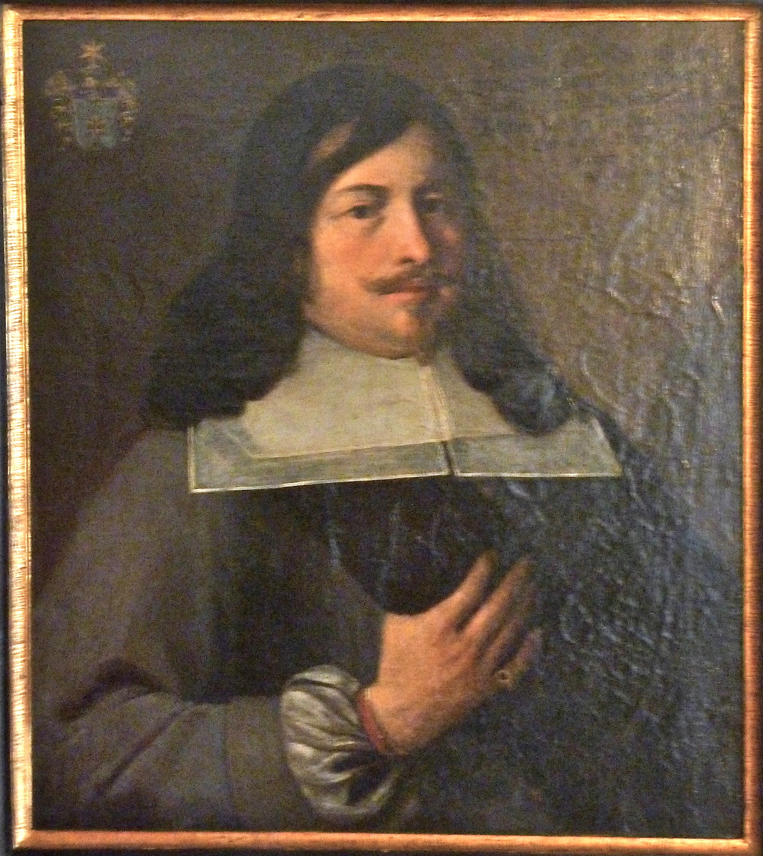 Clau Maissen auf einem Bild im Cuort Ligia Grischa